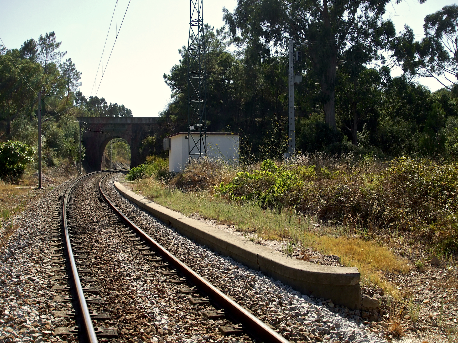 Tipo: A [Apeadeiro] Local: Cumeadas [Linha de Sines, PK 156] Data e hora: 23 de Julho de 2008 [17h16]